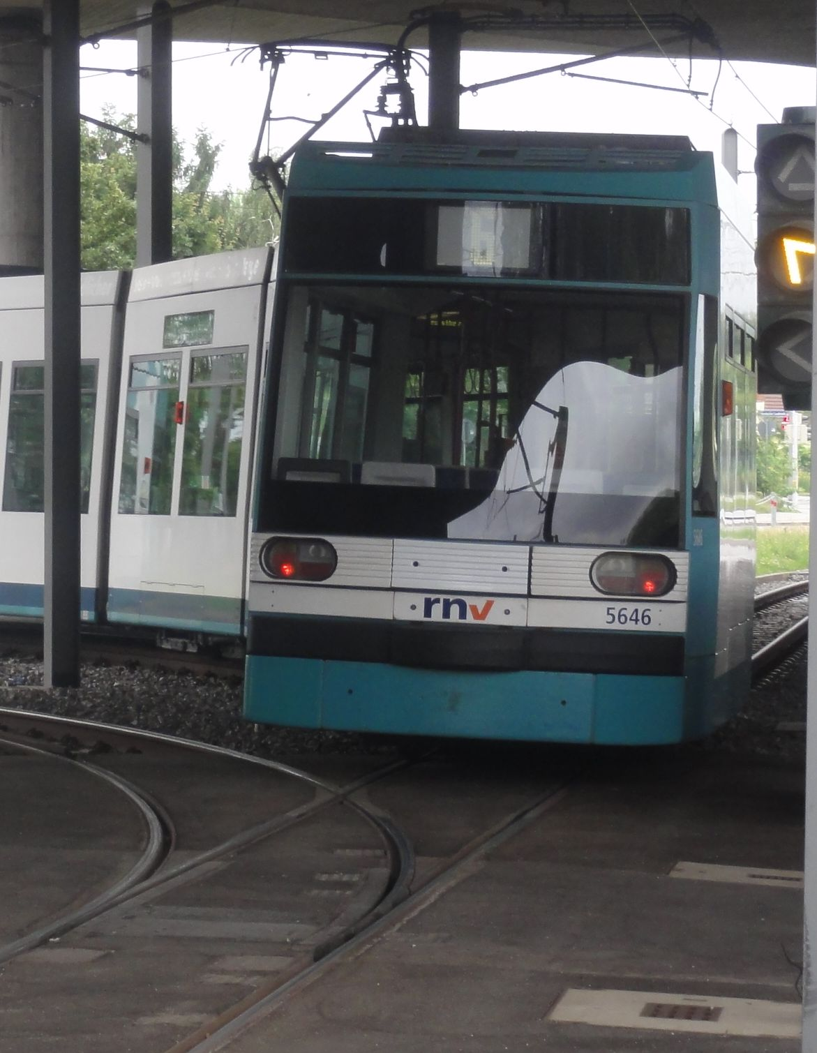 RNV-Wagen 5646 bei der Einfahrt in die Wendeschleife Mannheim-Neuostheim. Nach hinten rechts geht die Strecke weiter in Richtung Maimarkt.